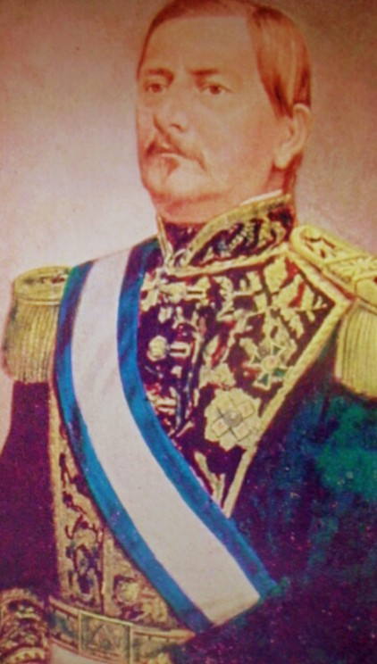 Barrios con la banda presidencial.